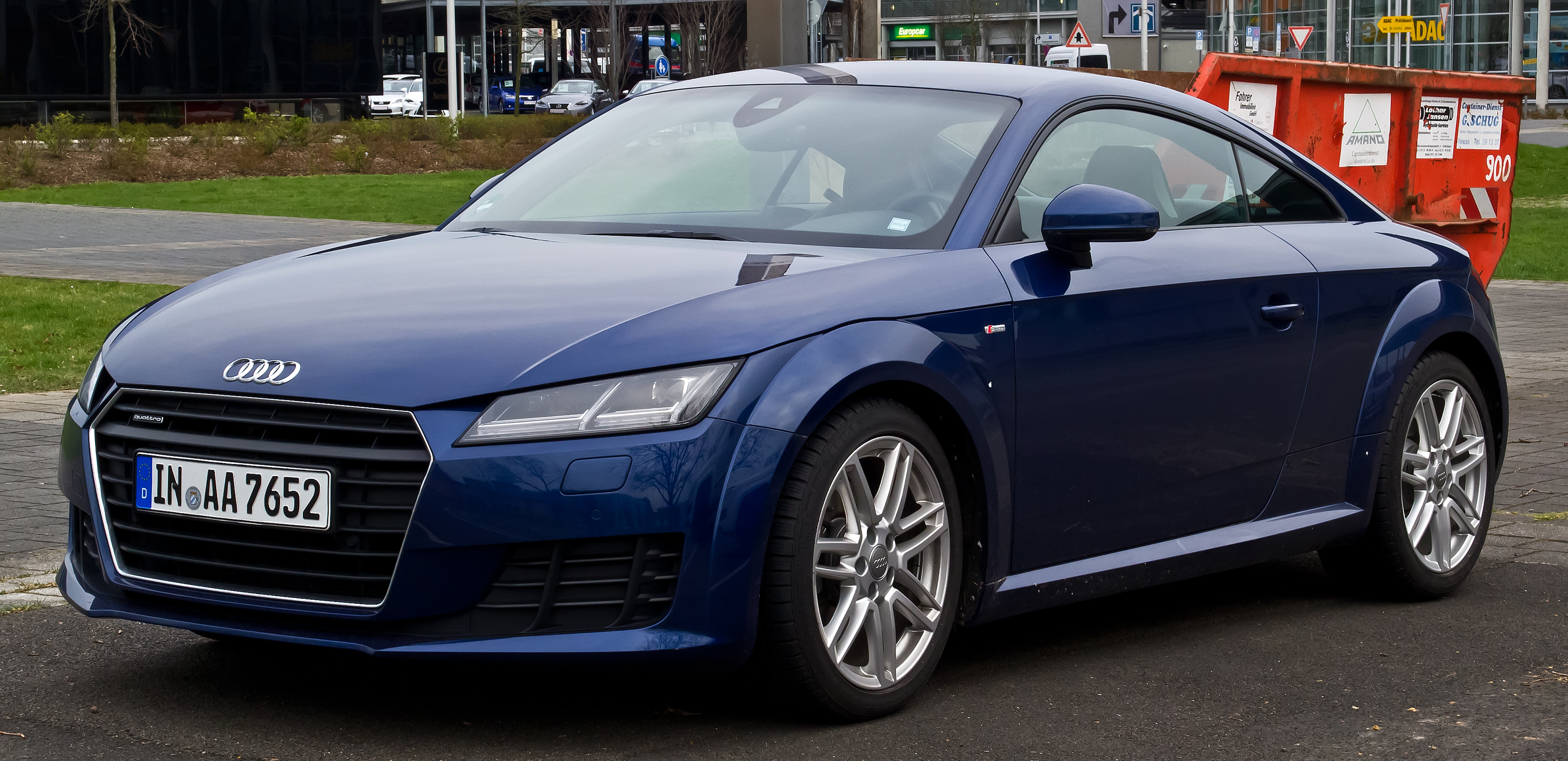 Audi TT Coupé 2.0 TFSI quattro S-line (8S)